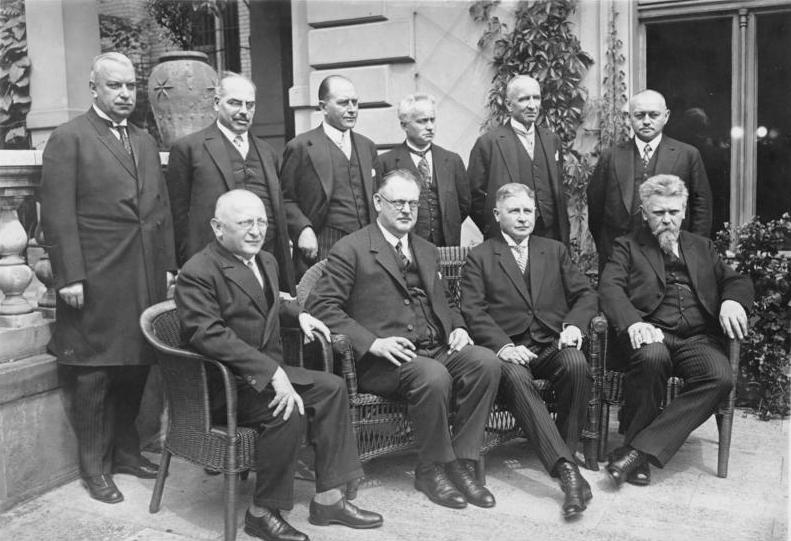 Kabinett Müller, Juni 1928 Information added by Wikimedia users.Kabinett Hermann Müller II 28. Juni 1928 – 27. März 1930 Personen identifiziert anhand anderer Aufnahme im Bundesarchiv: Bild 102-06154 stehend vlnr: Hermann Dietrich (DDP)-Baden, Ernährung (Demokart), Dr.Rudolf Hilferding, Finanzen (Sozialdem.), Dr.Julius Curtius, Wirtschaft (Dtsch. Volkspartei), Carl Severing Juneres (Sozialdem.), Theodor von Guérard besetztes Gebiet und Verkehr (Zentr.), Georg Schätzel, Post (bayer. Volkspartei). Sitzend vlnr: Erich Koch-Weser Justizminister (Demokrat), Hermann Müller, Reichskanzler (Sozialdemokrat), Wilhelm Groener, Reichswehrminister (parteilos) Rudolf Wissell, Reichsarbeitsminister (Sozialdemokrat).